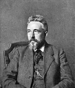 Бруни, Николай Александрович